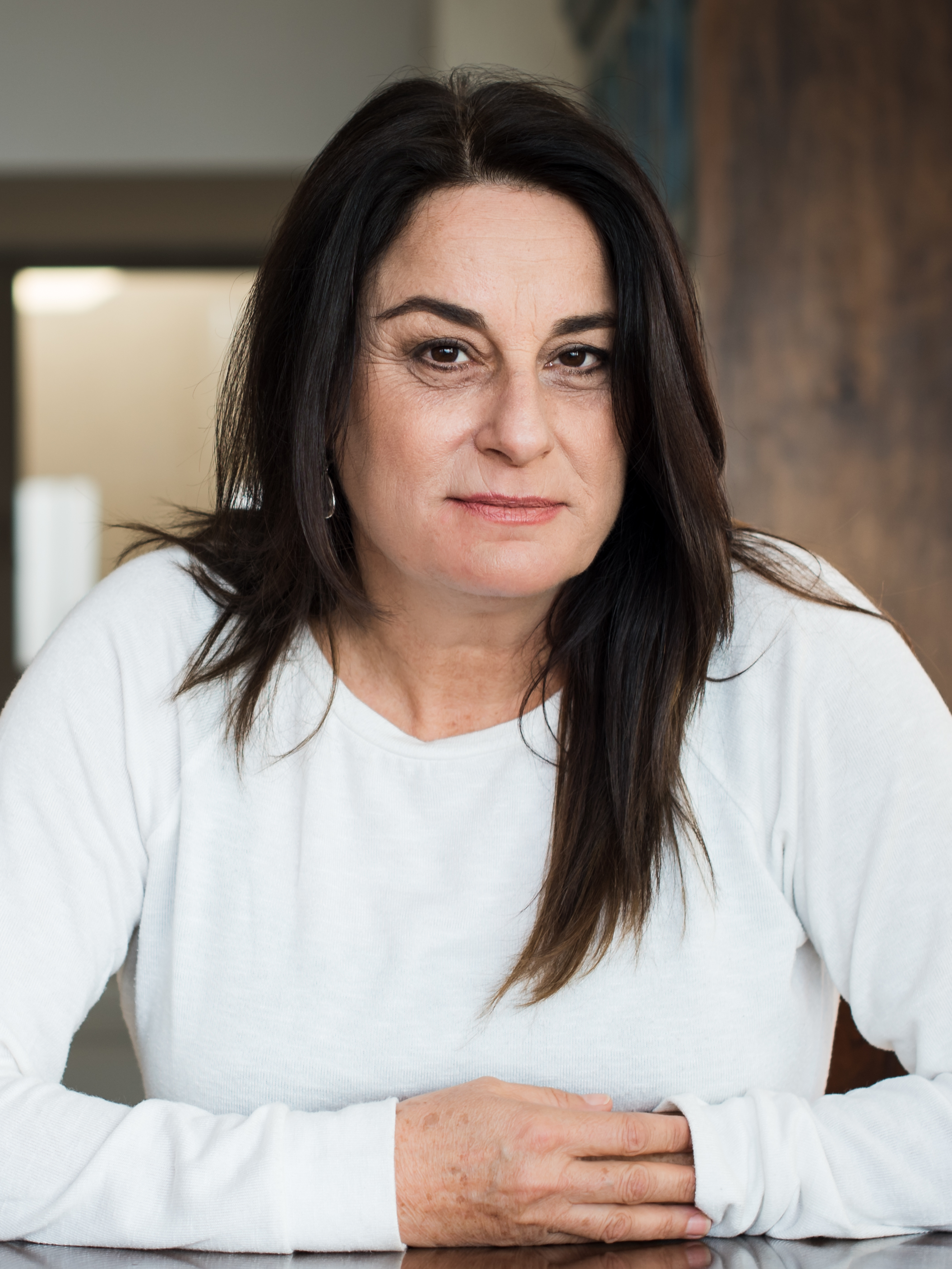 רונה רמון